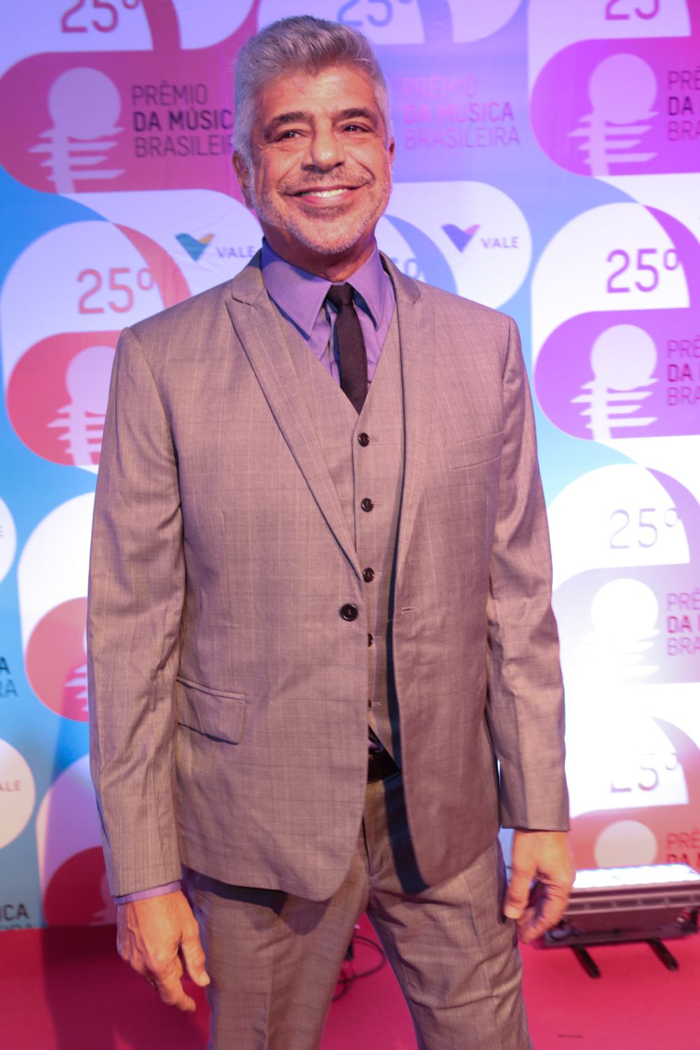 Lulu Santos durante o 25º Prêmio da Música Brasileira no Theatro Municipal.